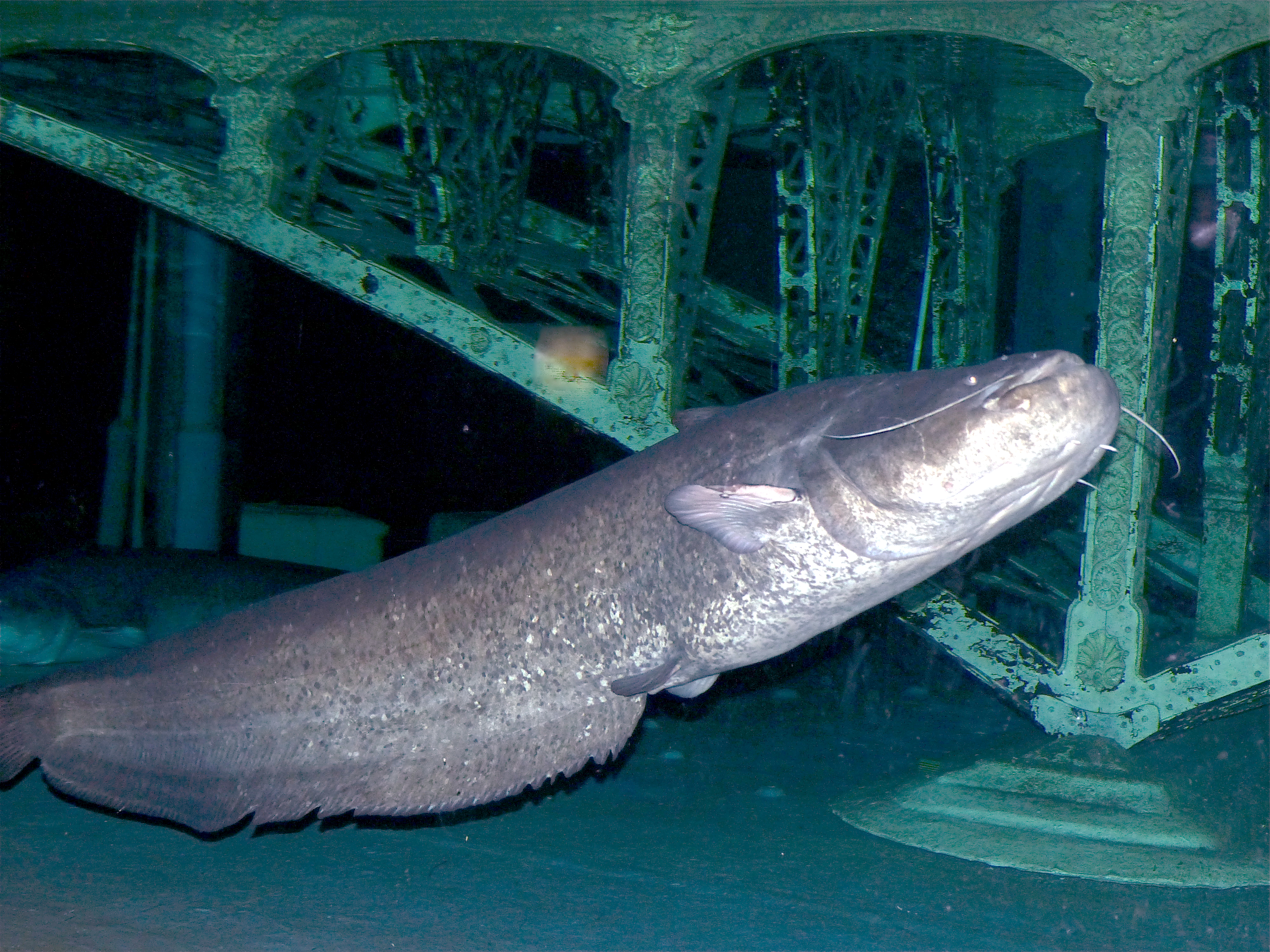 Aquarium du Val-de-Loire, Lussault-sur-Loire, Indre-et-Loire, FRANCE